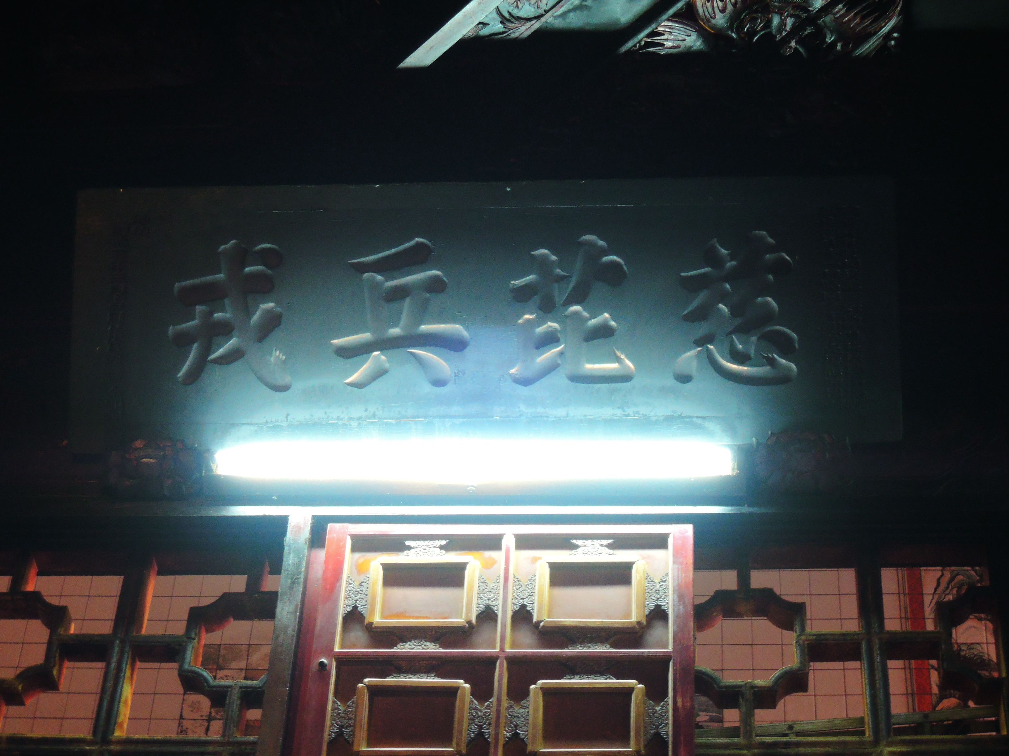 地址：臺中市清水區鰲峰里大街路206號